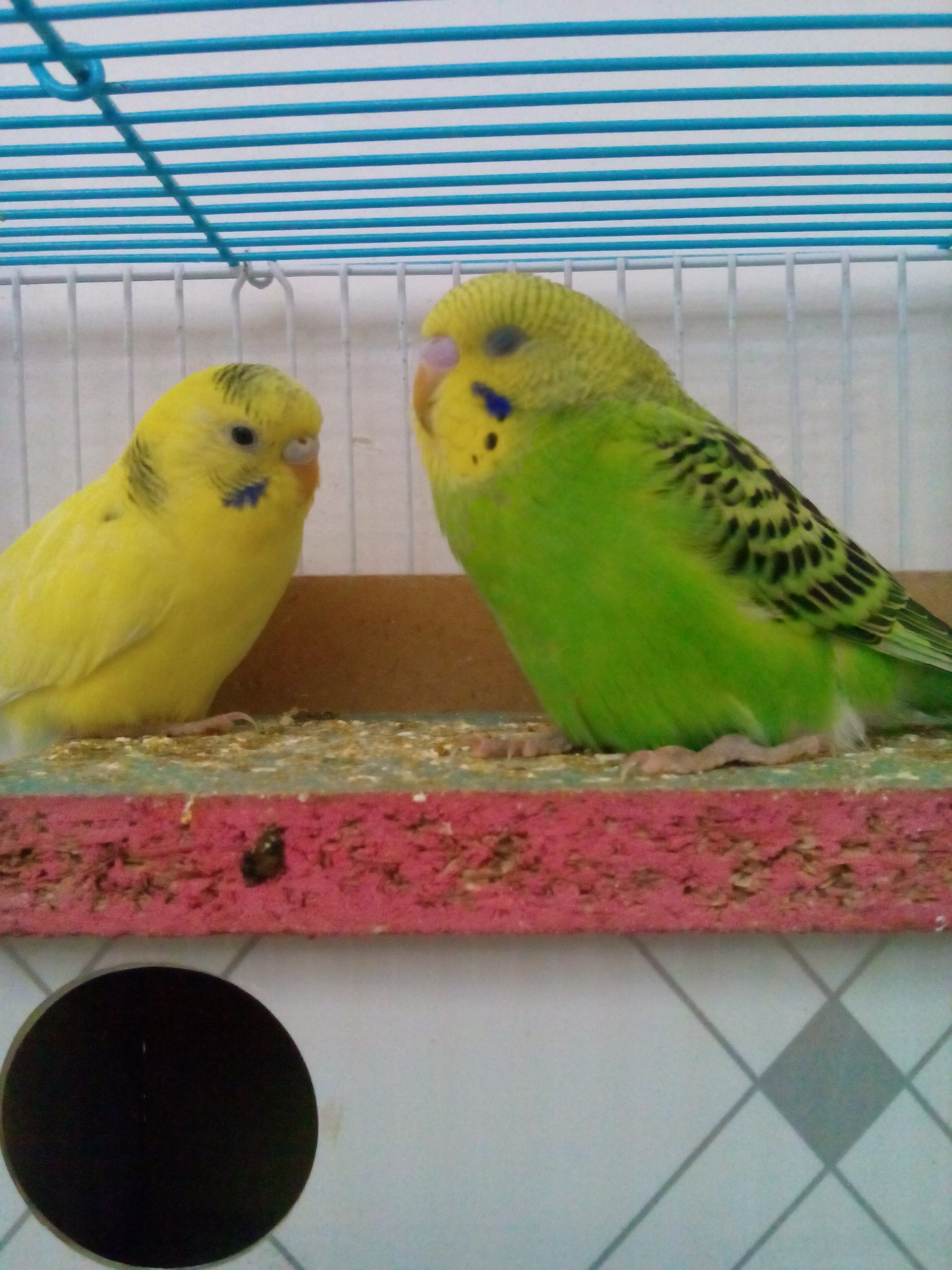 زوج من طير الدرّة أو الطائر الطيّب في قفص